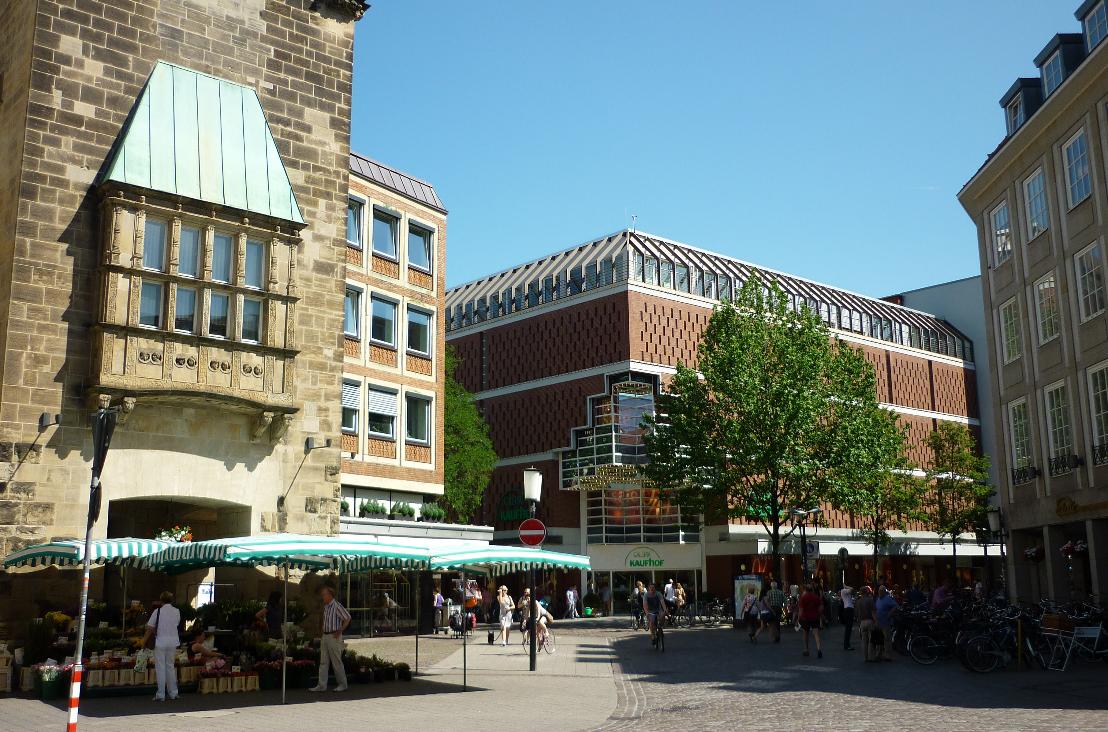 Münster (Westfalen). Beginn der Einkaufsmeile Ludgeristraße mit Galeria Kaufhof. Blick vom Prinzipalmarkt.